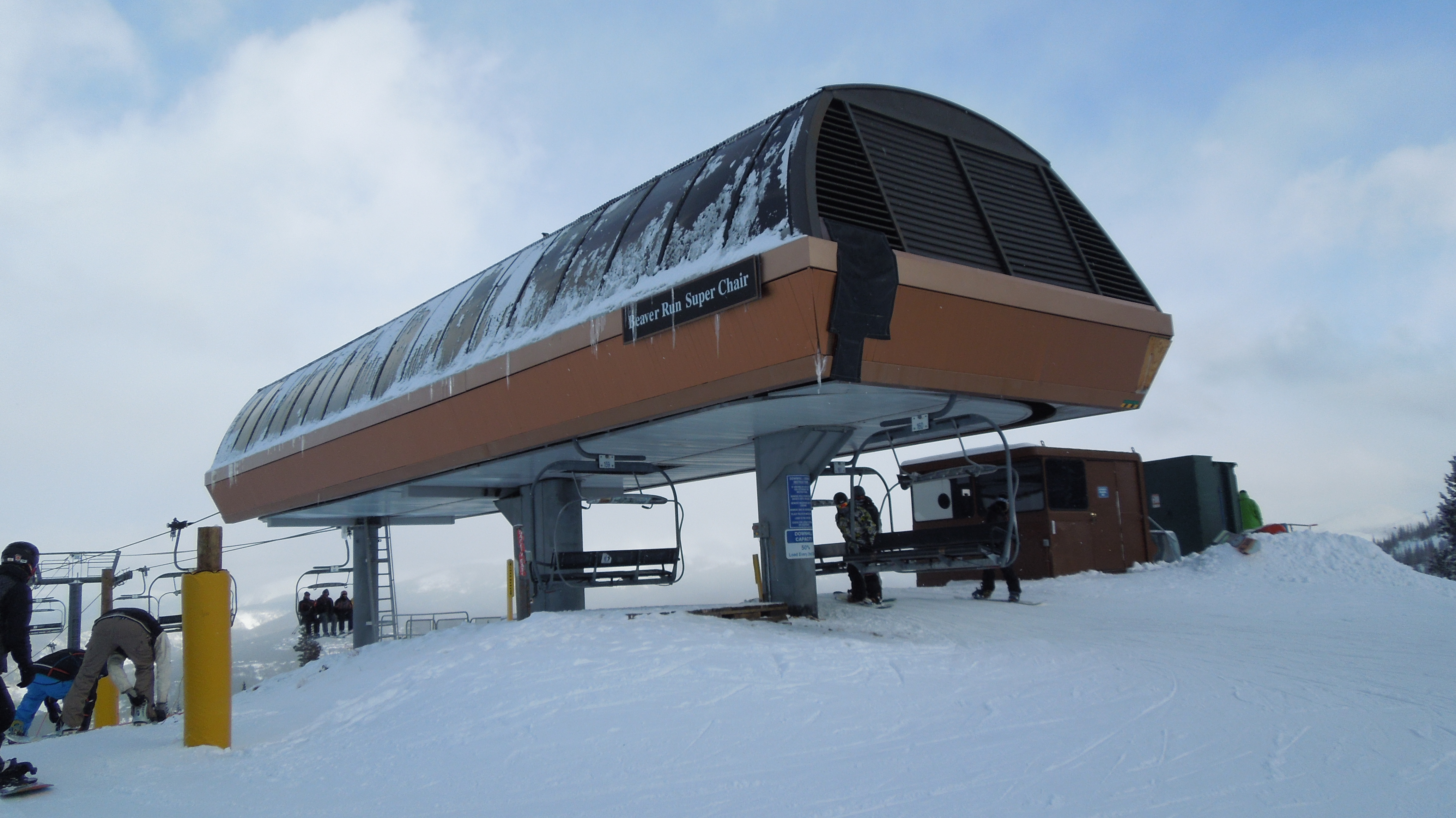 User:DReifGalaxyM31 DReifGalaxyM31 (User talk:DReifGalaxyM31 talk) Taken January 1, 2013. DReifGalaxyM31 (talk) Taken January 1, 2013.